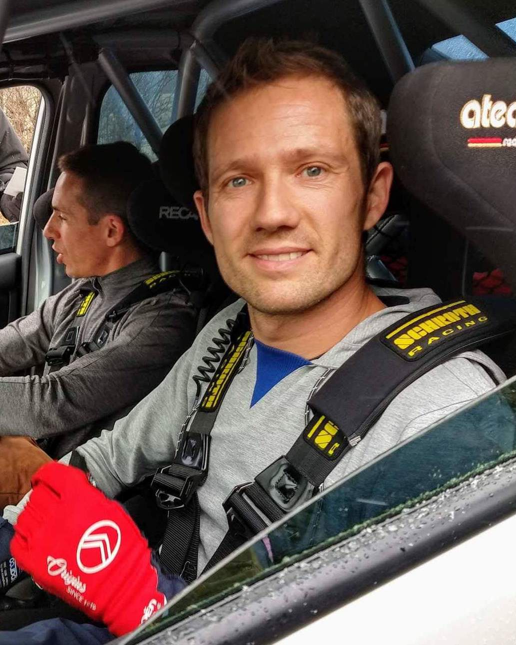 Sébastien Ogier et Julien Ingrassia durant les reconnaissances du Rallye Monte-Carlo 2019.